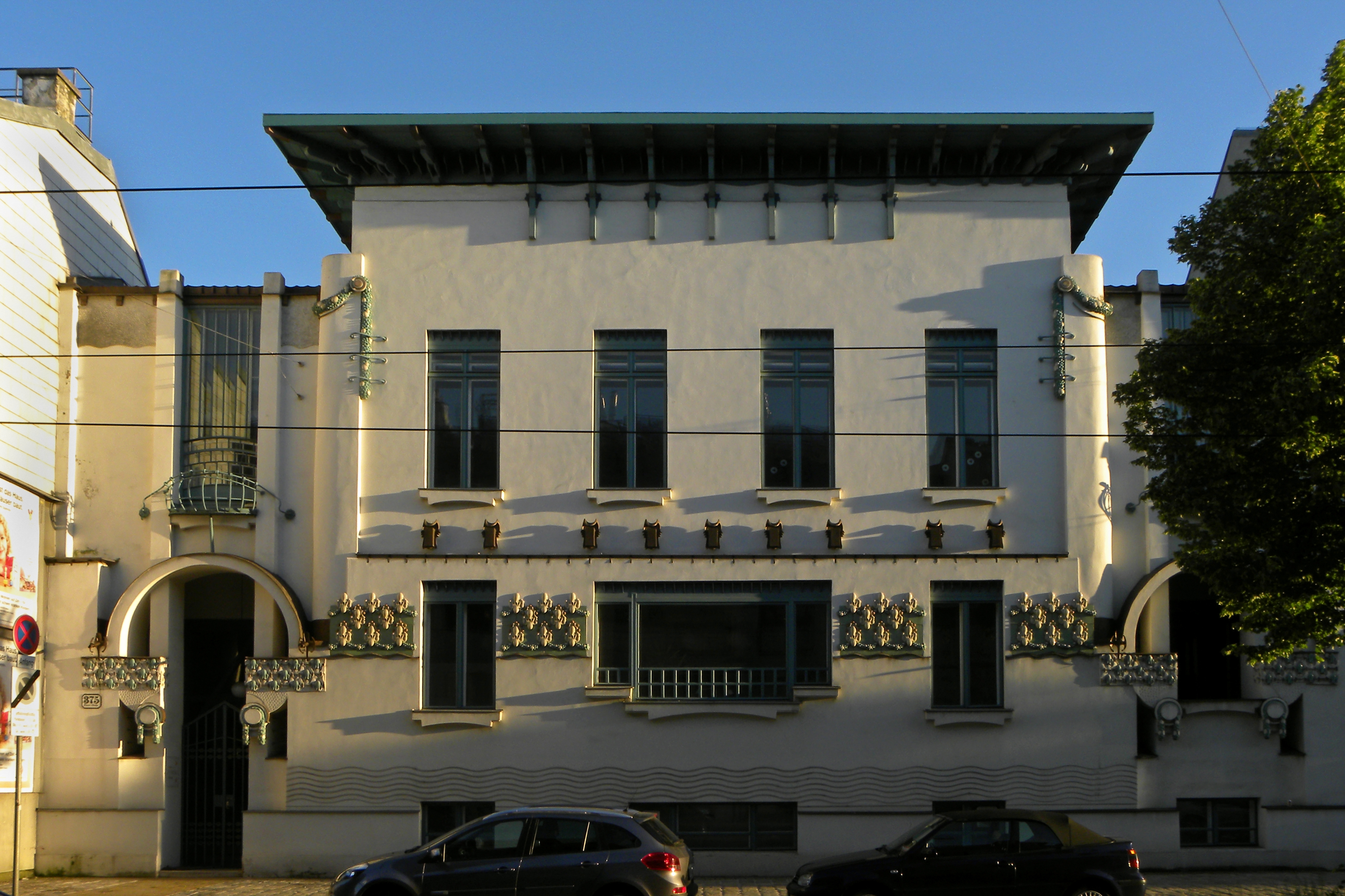 Villa Vojcsik